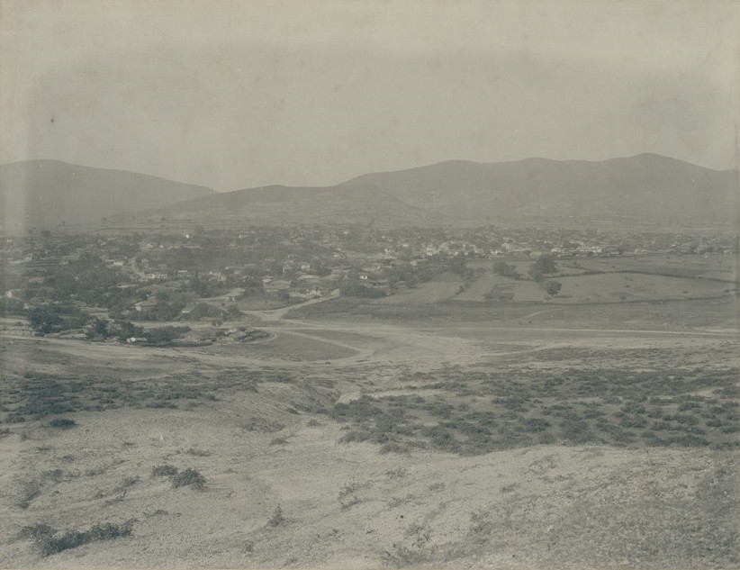 Общ изглед на Преслав, 22 юли 1912 г.